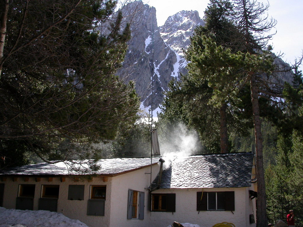 Refugi Mallafré